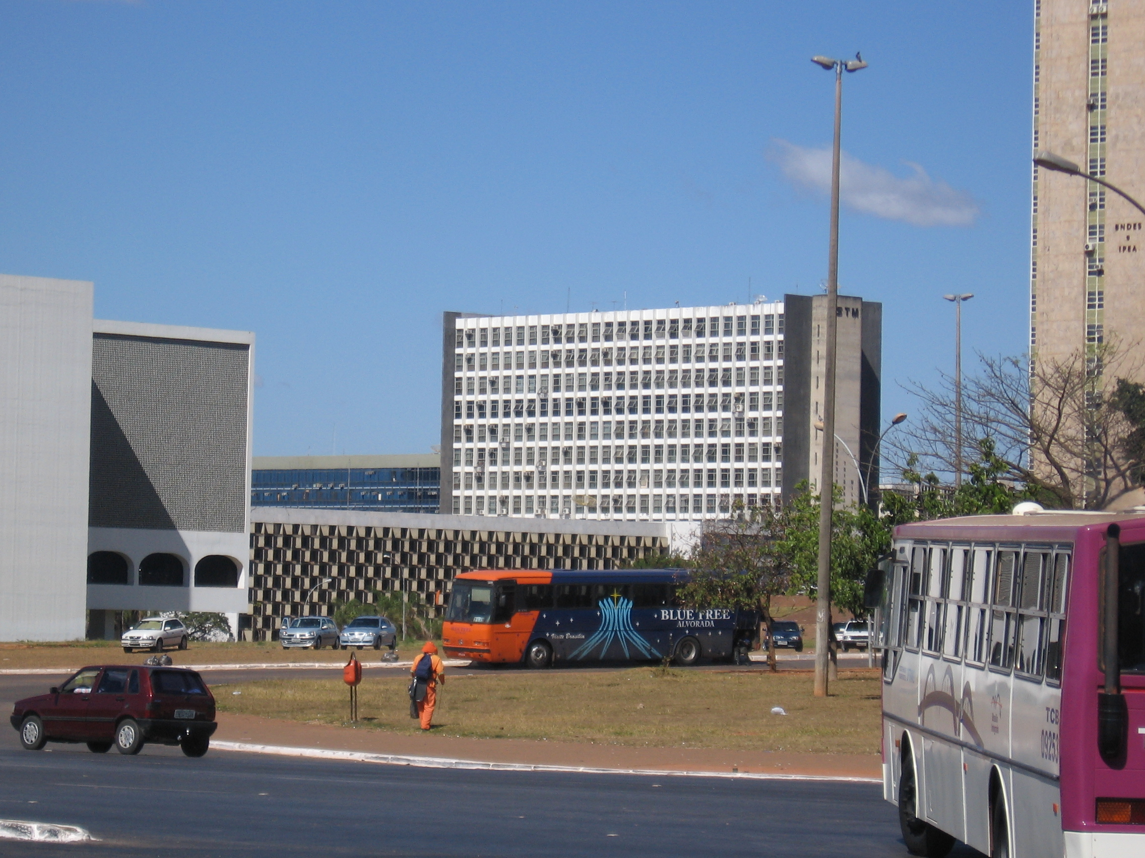 Vista do STM e prédios vizinhos, a partir da Rodoviária